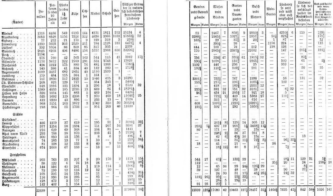 Tabelle Herzogtum Berg 1708